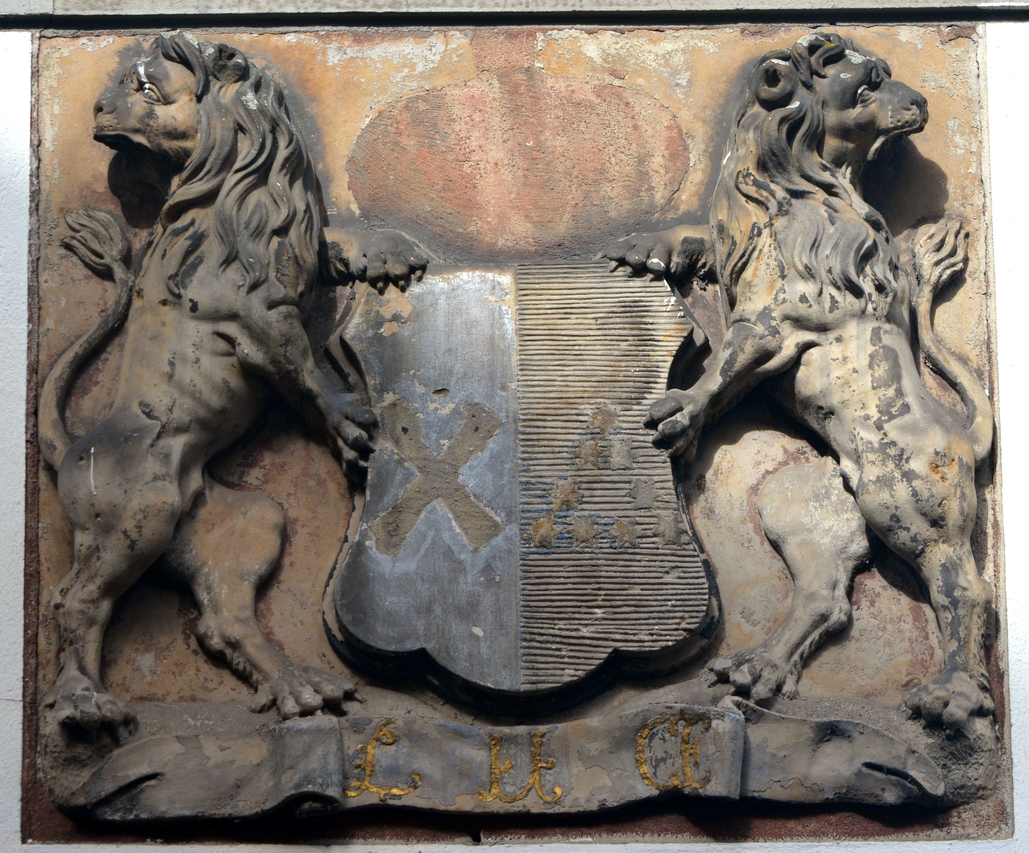 Braunschweig, Leopoldstraße 29: Wappen des ehemaligen Hauses der Loge Carl zur gekrönten Säule